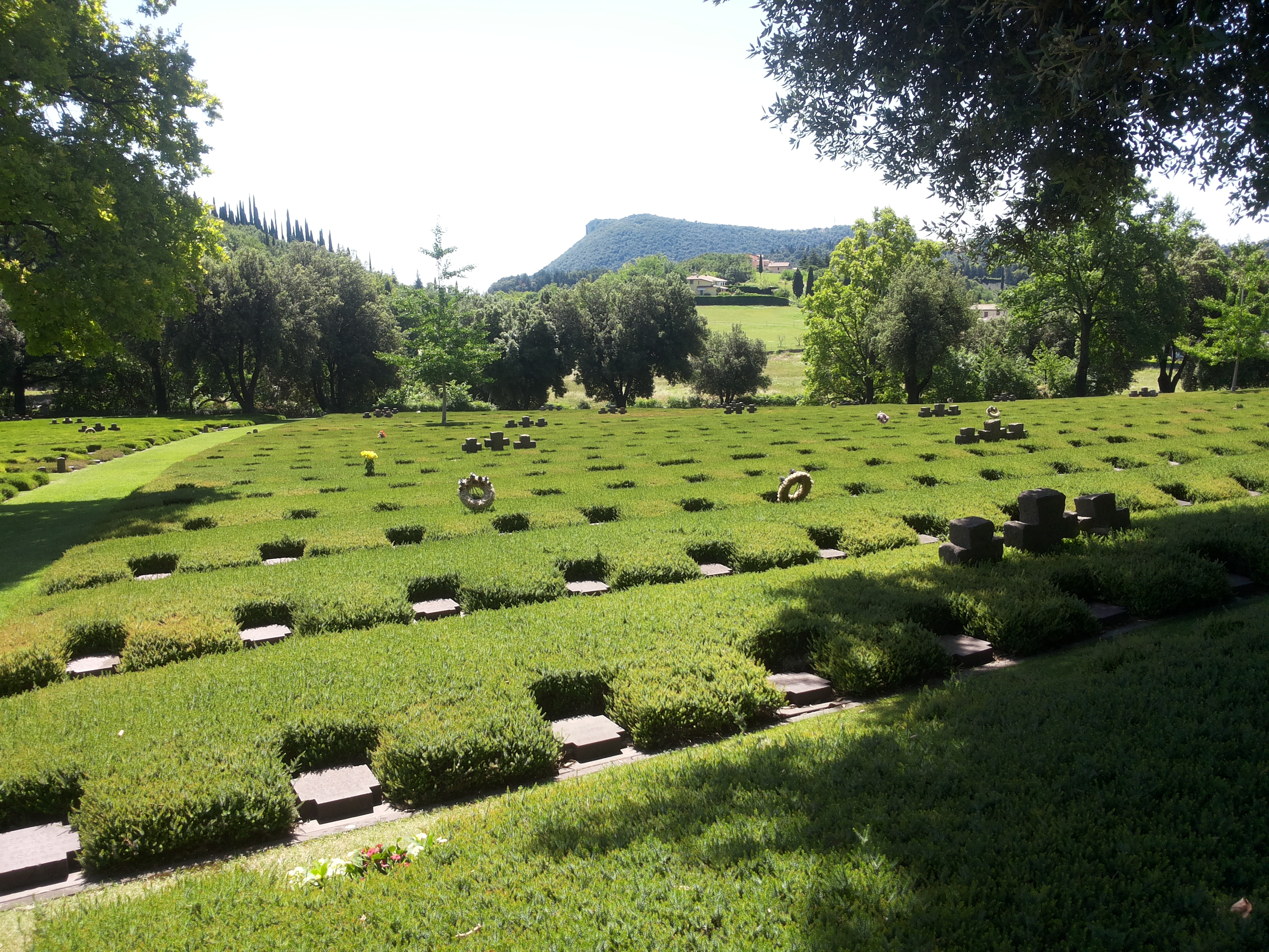 Cimitero militare tedesco a Costermano (provincia di Verona)